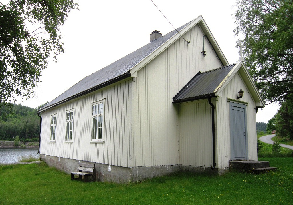 Stranda kapell ved Farrisvannet (Porsgrunn kommune)